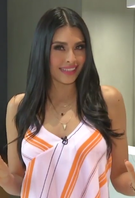 Kristal Silva en el canal de PielClinic